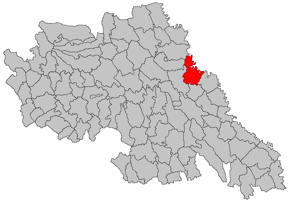 Categorie:Hărţi ale judeţului Iaşi